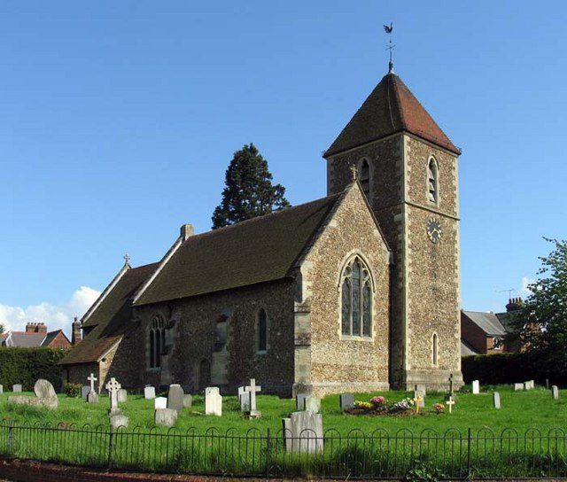 St Peter, Holwell, Herts